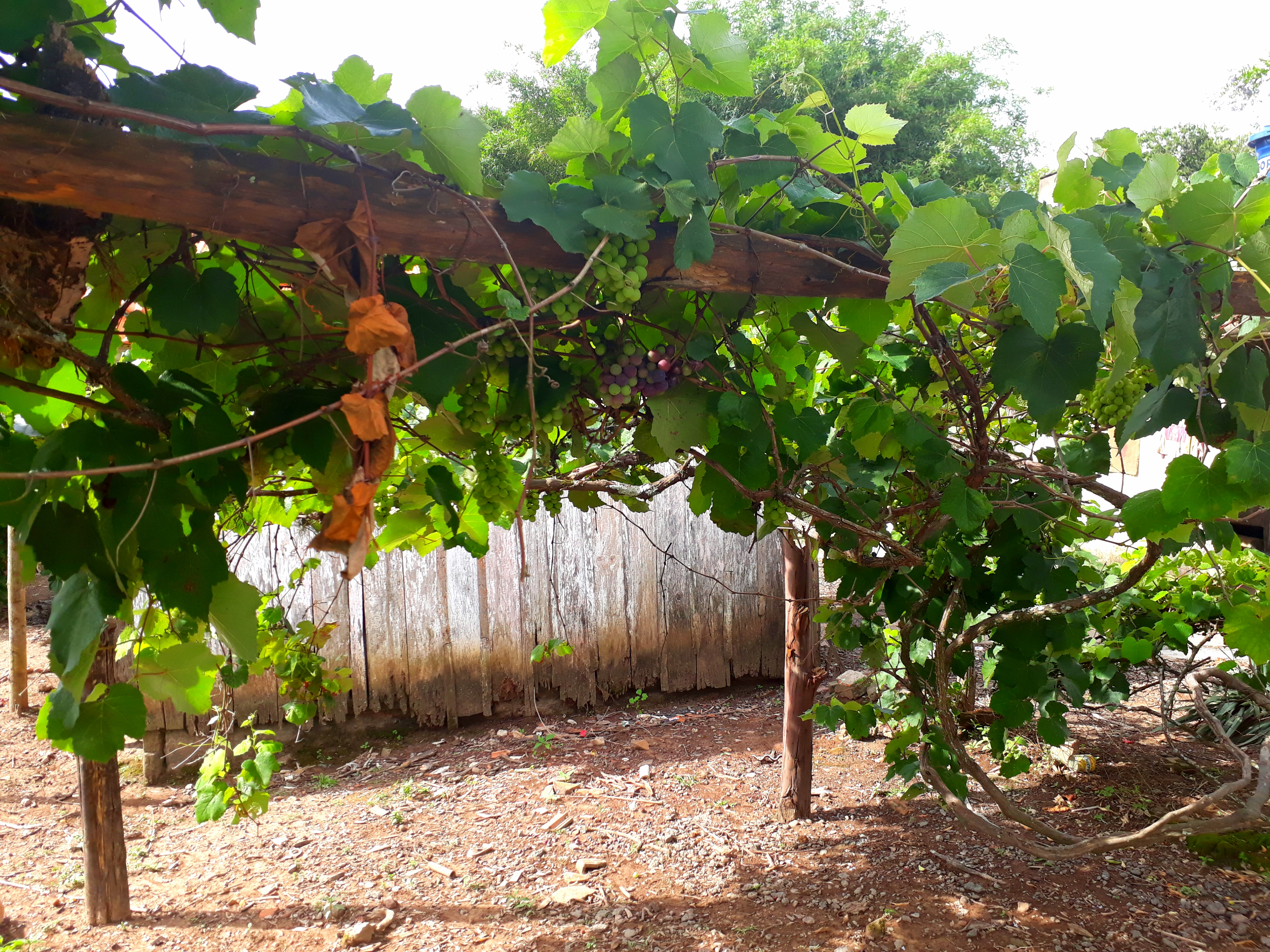 Imagem de uma videira em uma pequena propriedade rural de agricultura familiar no município de Ortigueira, no Paraná.